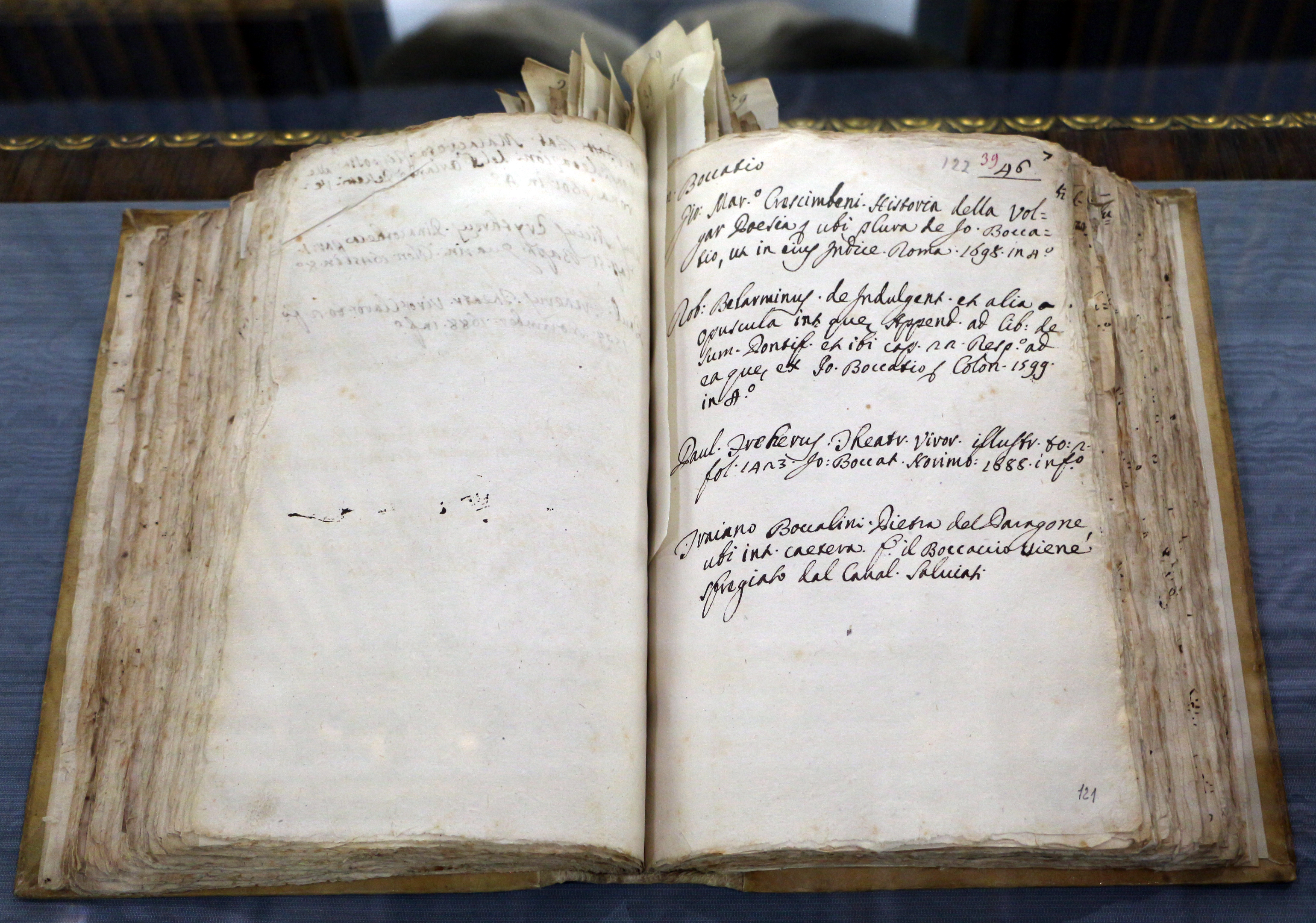 Biblioteca Marucelliana This is a photo of a monument which is part of cultural heritage of Italy.